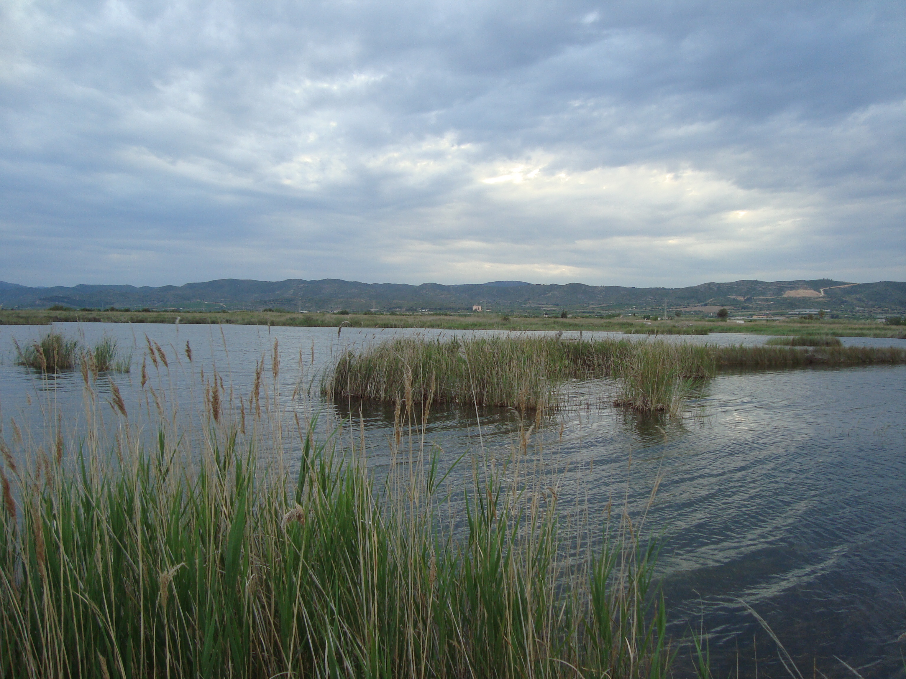 Lagunas de Torreblanca This is a photography of a Special Area of Conservation in Spain with the ID: ES0000060. Natura2000 entry, EEA entry